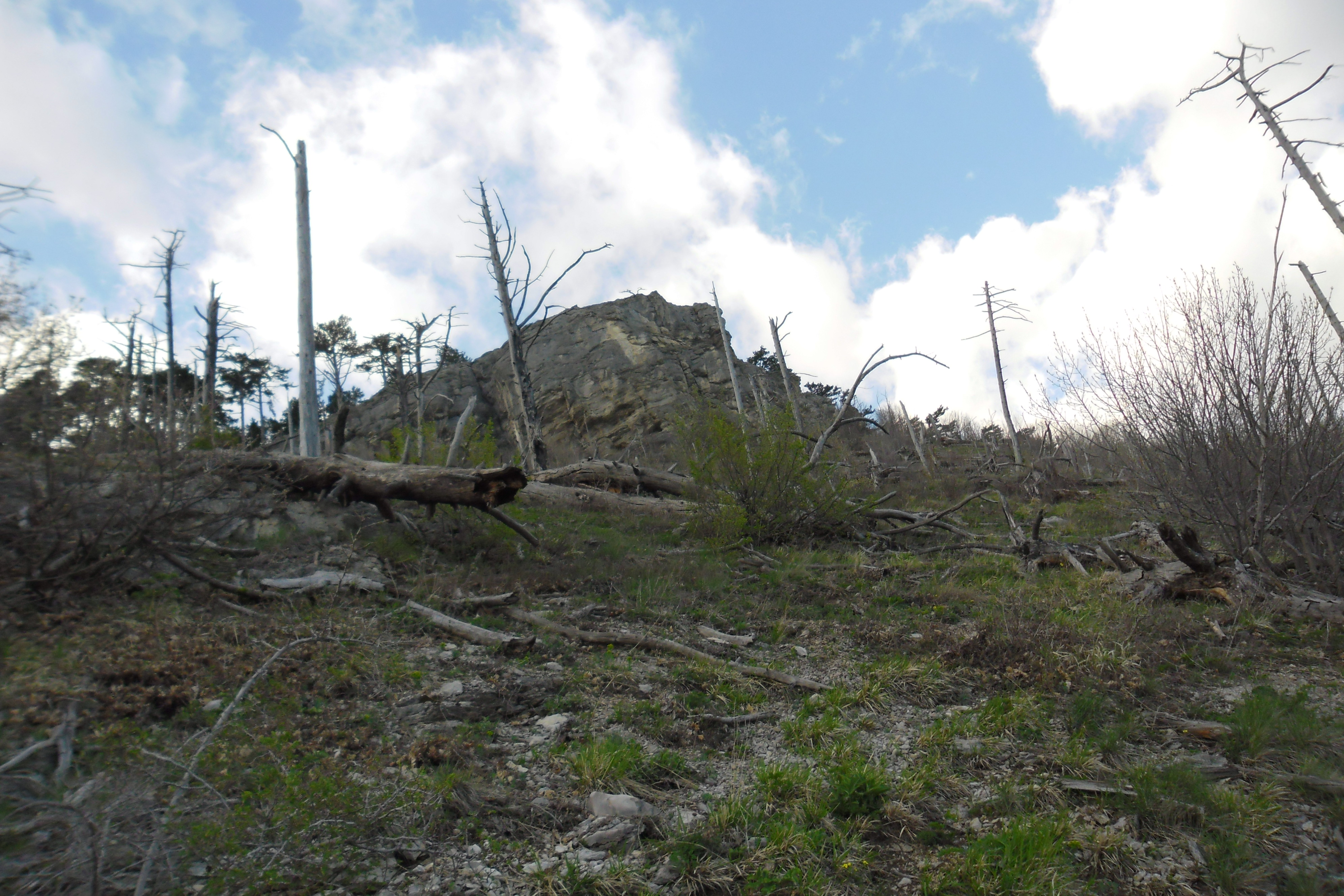 Педи-Кая